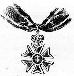 Ilustracja do Encyklopedii staropolskiej T.3 309 - Krzyż bożogrobców miechowski